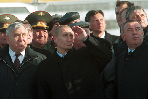 РОСТОВ-НА-ДОНУ. Во время показательных демонстрационных полетов на летном поле ОАО «Роствертол». В фуражке позади Путина Трошев, Геннадий Николаевич